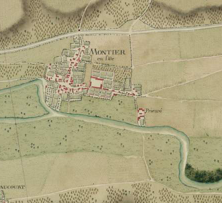 Atlas de Trudaine pour la généralité de Châlons : Chemin de Vitry-le-François à Bar-sur-Aube. Extrait pour le village de Montier-en-l'Isle